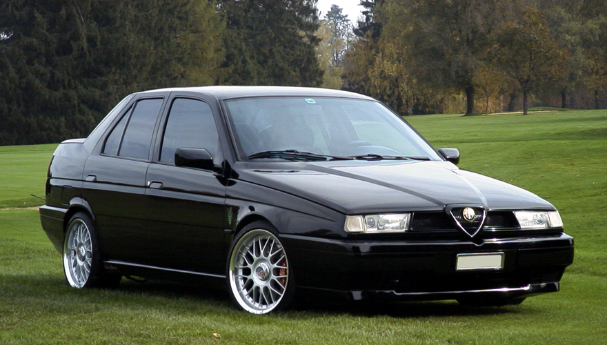 Alfa Romeo 155 Q4